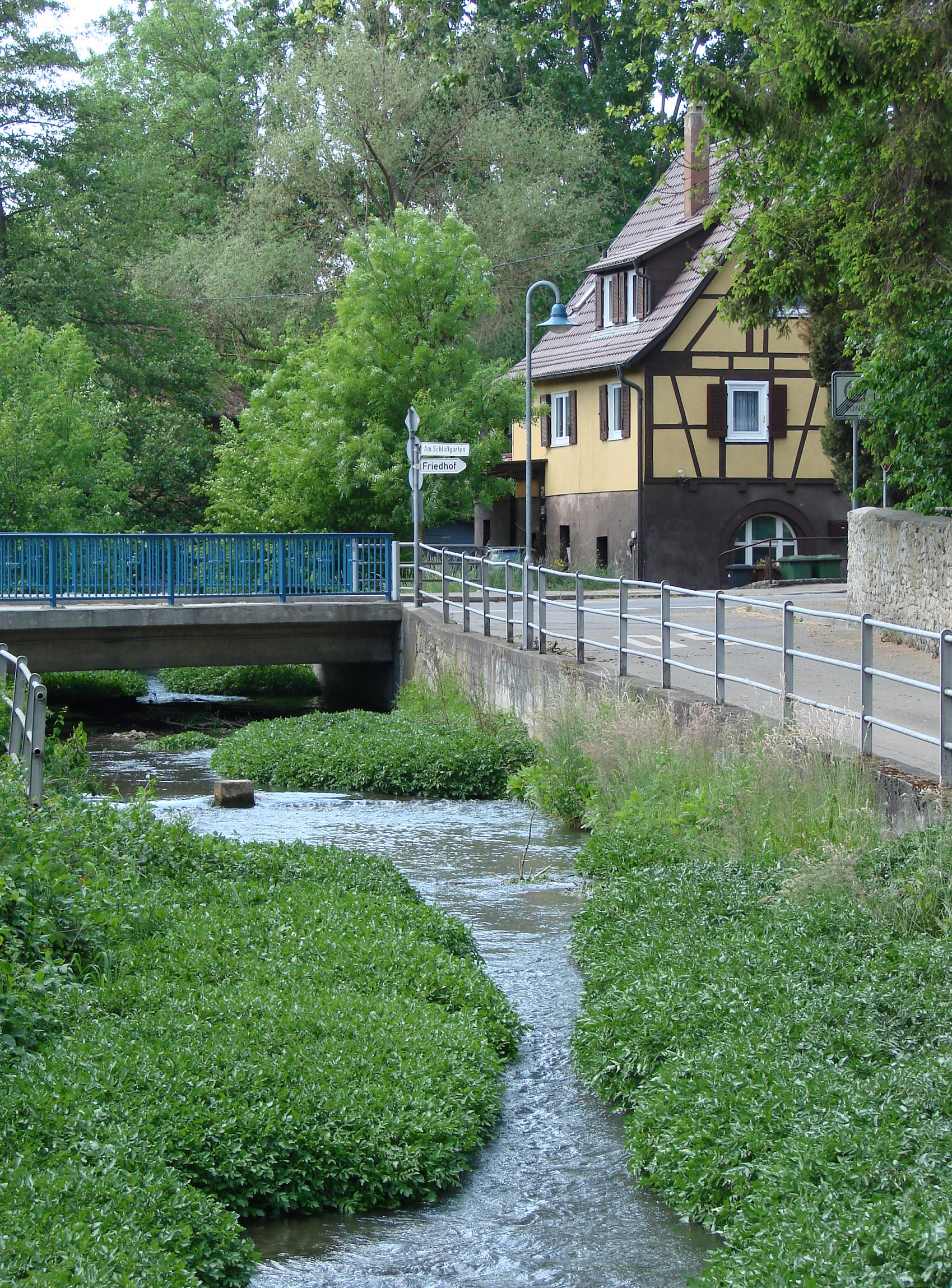 Riet, the Strudelbach